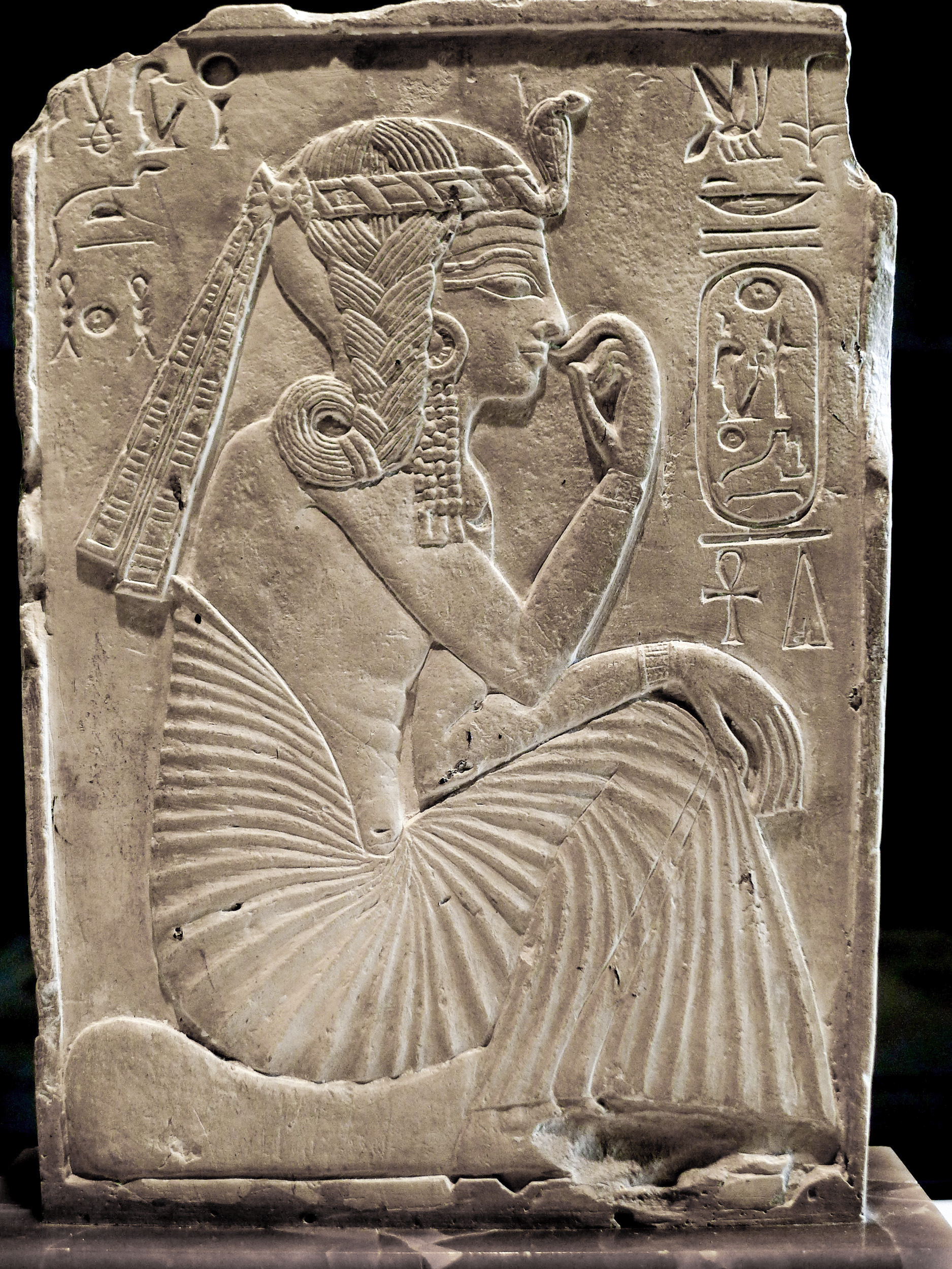 Stèle à deux faces : l’image ci-dessus montre la face représentant le roi dans l’attitude de l’enfance, assis, le doigt à la bouche et coiffé de la tresse latérale ; l’autre face montre un vizir (non identifié) honorant le dieu Ptah.